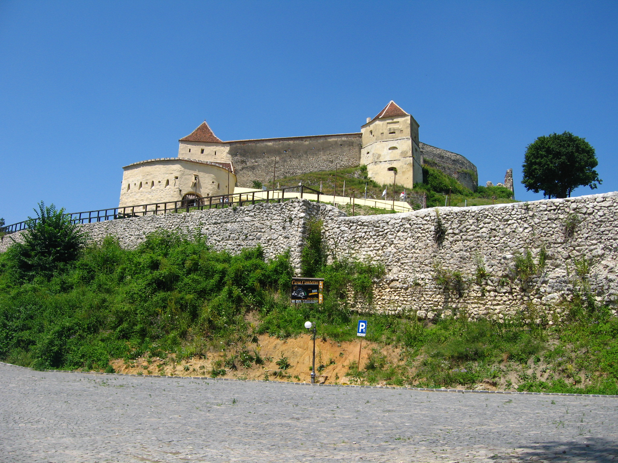 Cetatea Râşnov